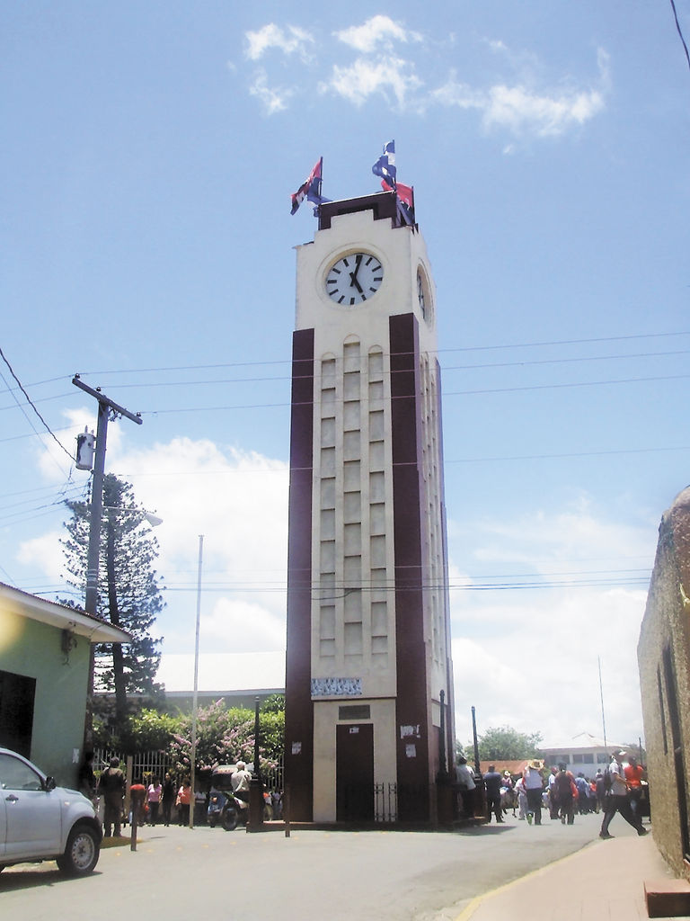 Reloj de Diriamba